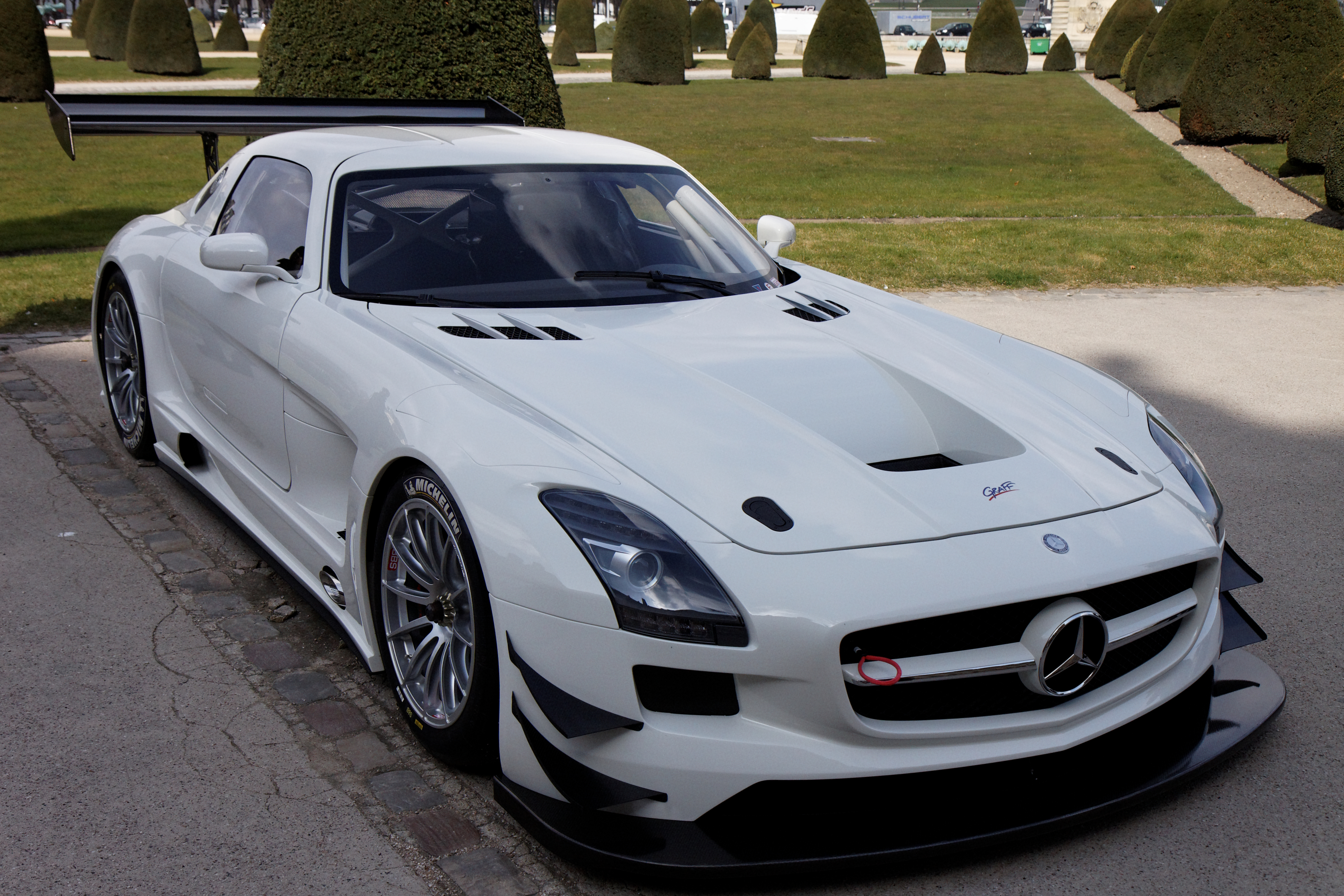 Photographie prise lors de la présentation du Blancpain Endurance series aux Invalides à Paris en mars 2011.